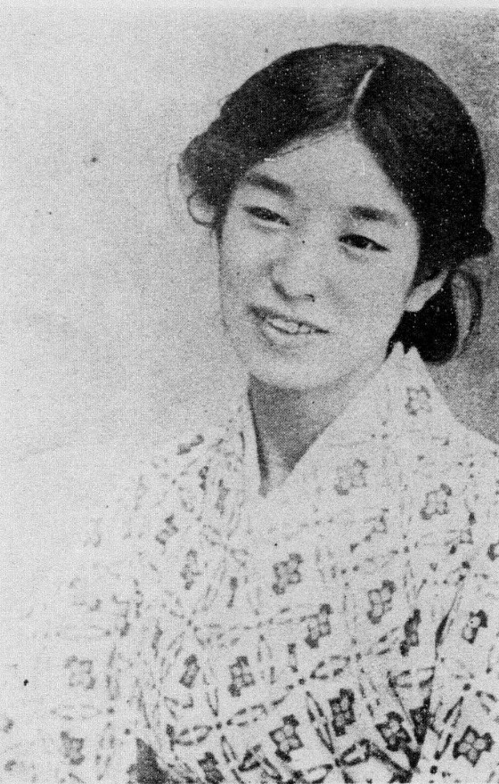 篠原淺茅 しのはらあさじ（file名のasakoは間違い）